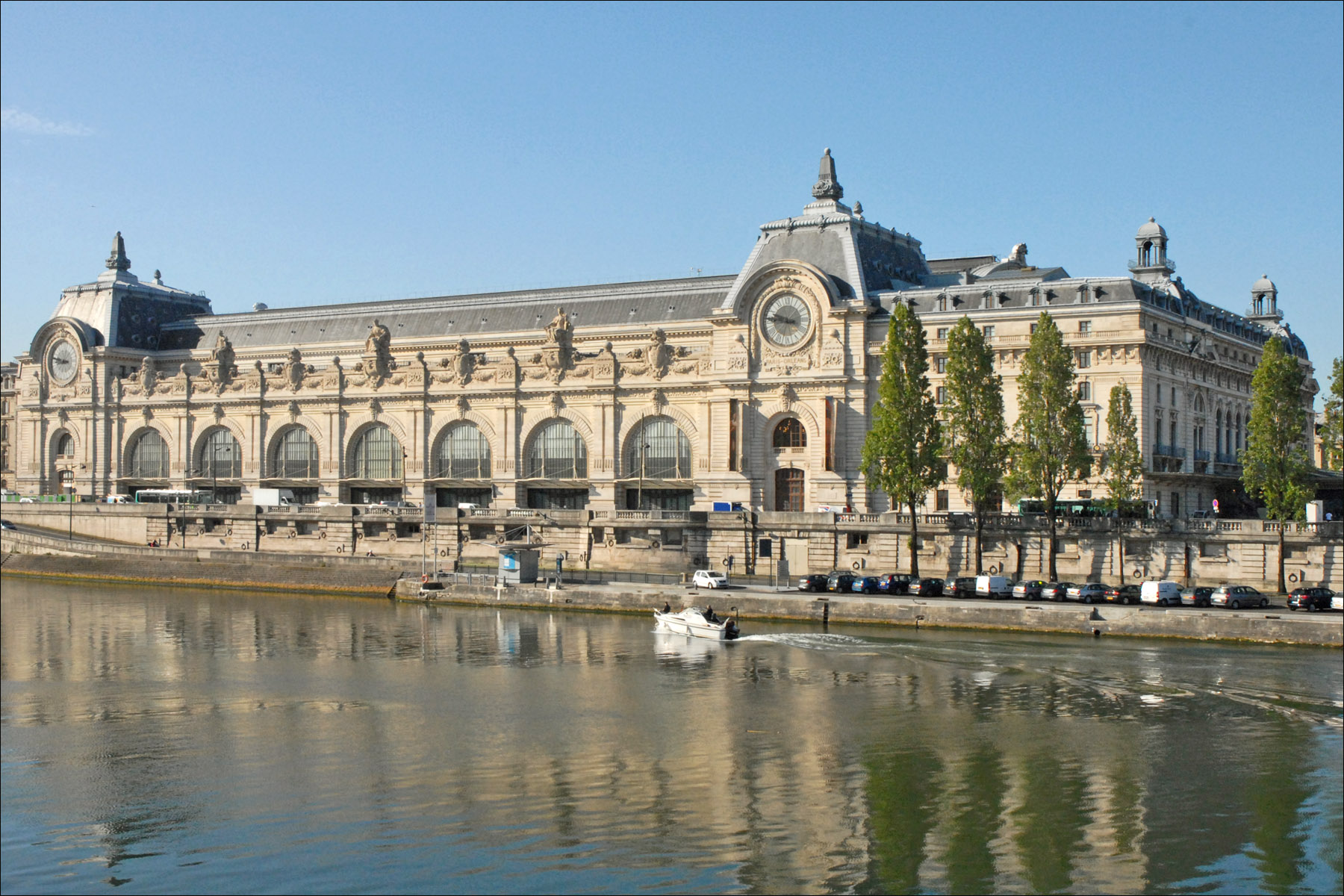 Le musée d’Orsay est un musée national situé à Paris, sur la rive gauche de la Seine, aménagé dans l’ancienne gare d'Orsay (1898). Les collections du musée présentent la peinture et la sculpture occidentale de 1848 à 1914[2], ainsi que les arts décoratifs, la photographie et l’architecture. (extrait de Wikipedia)